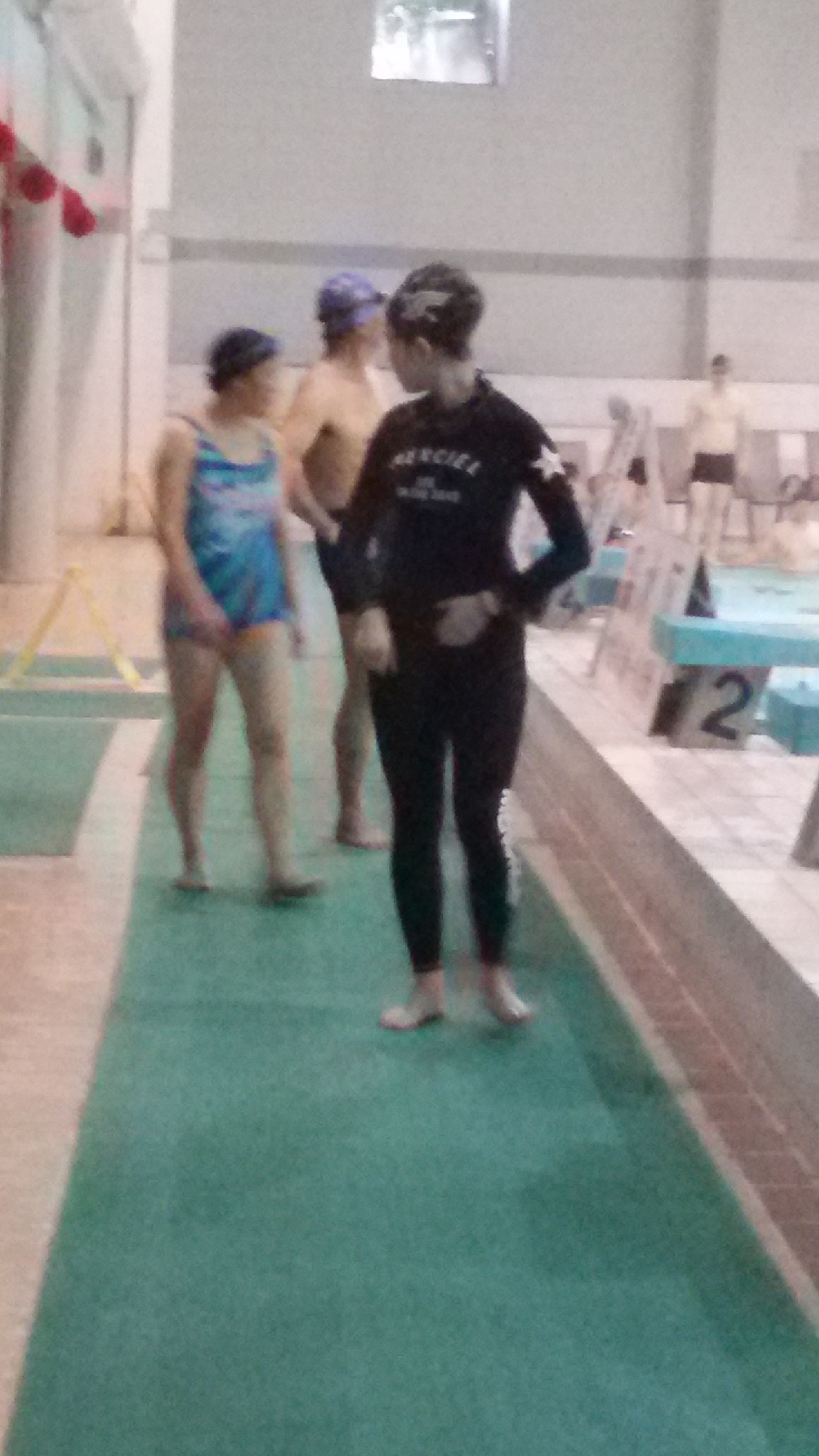 粵語: 女仔着嘅全身游水裝